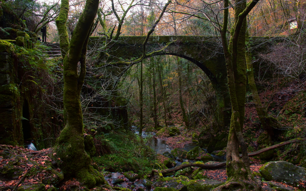 Fragas do Eume This is a photography of a Special Area of Conservation in Spain with the ID: ES1110003. Natura2000 entry, EEA entry